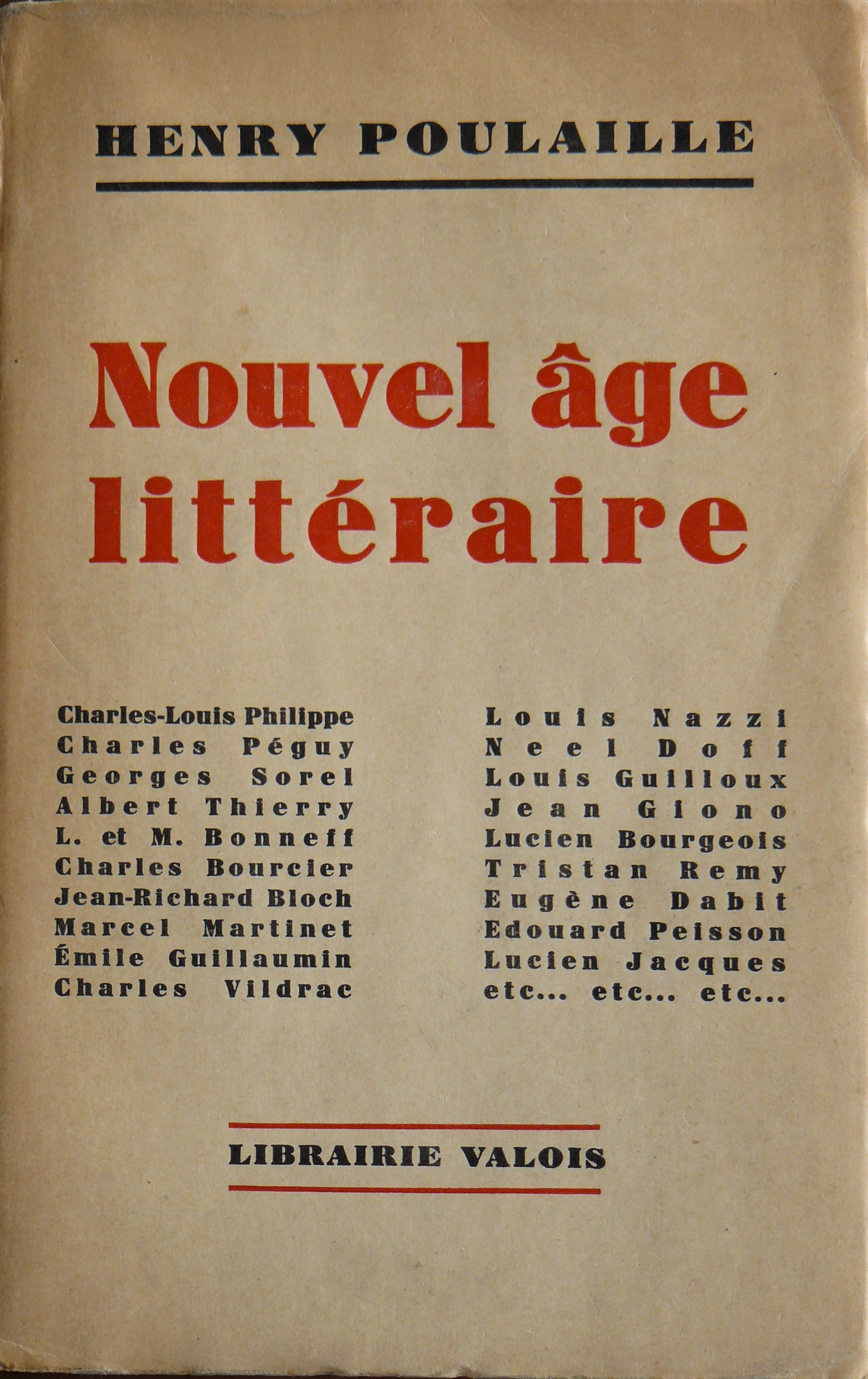 Plat de couverture de "Nouvel âge littéraire", livre publié par Henry Poulaille aux éditions de la Librairie Valois, à Paris, en 1930, où il définit sa conception de la "littérature prolétarienne".